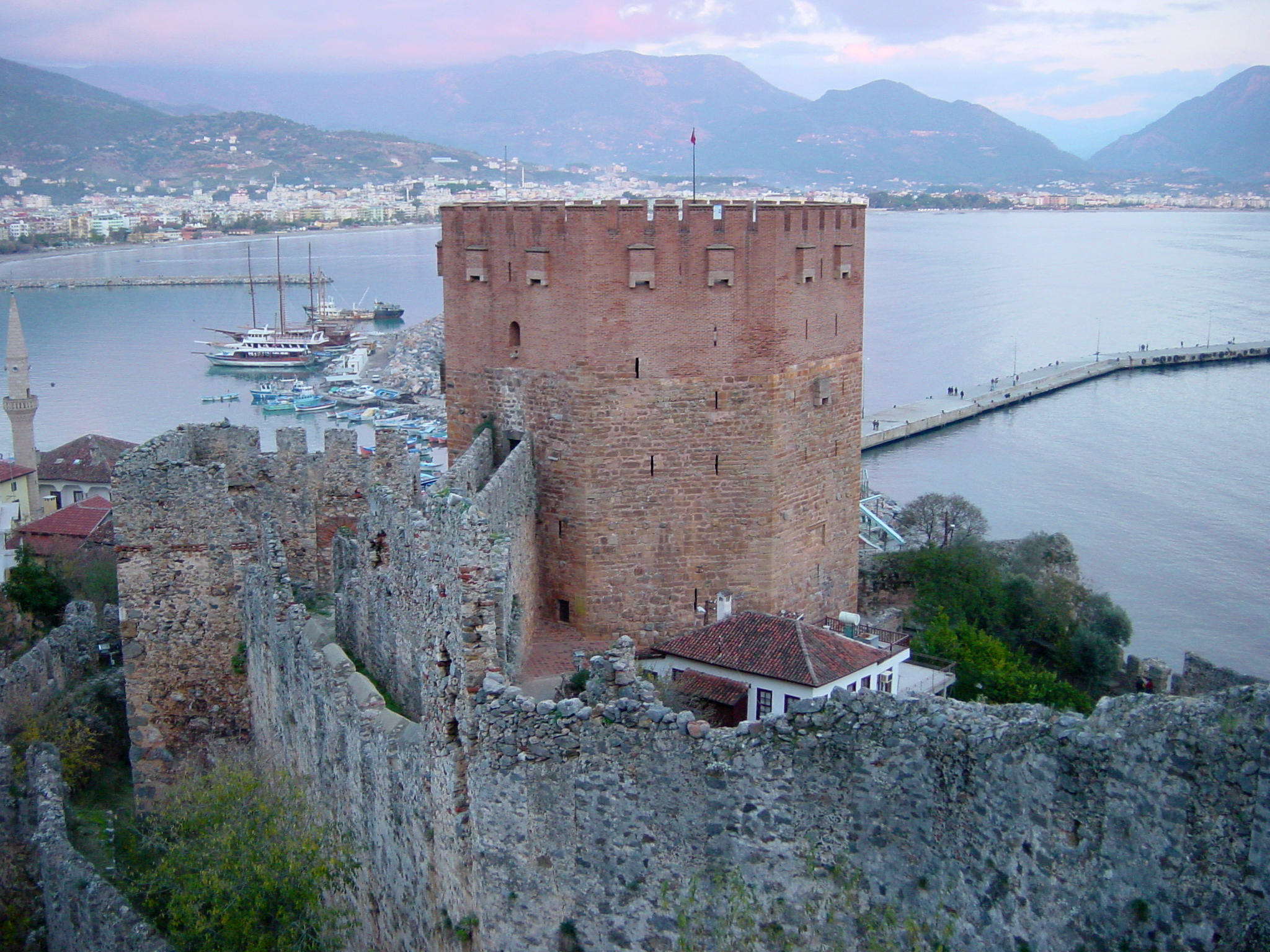 2003-12-28 01-04 T�rkei 061 Alanya, Roter Turm